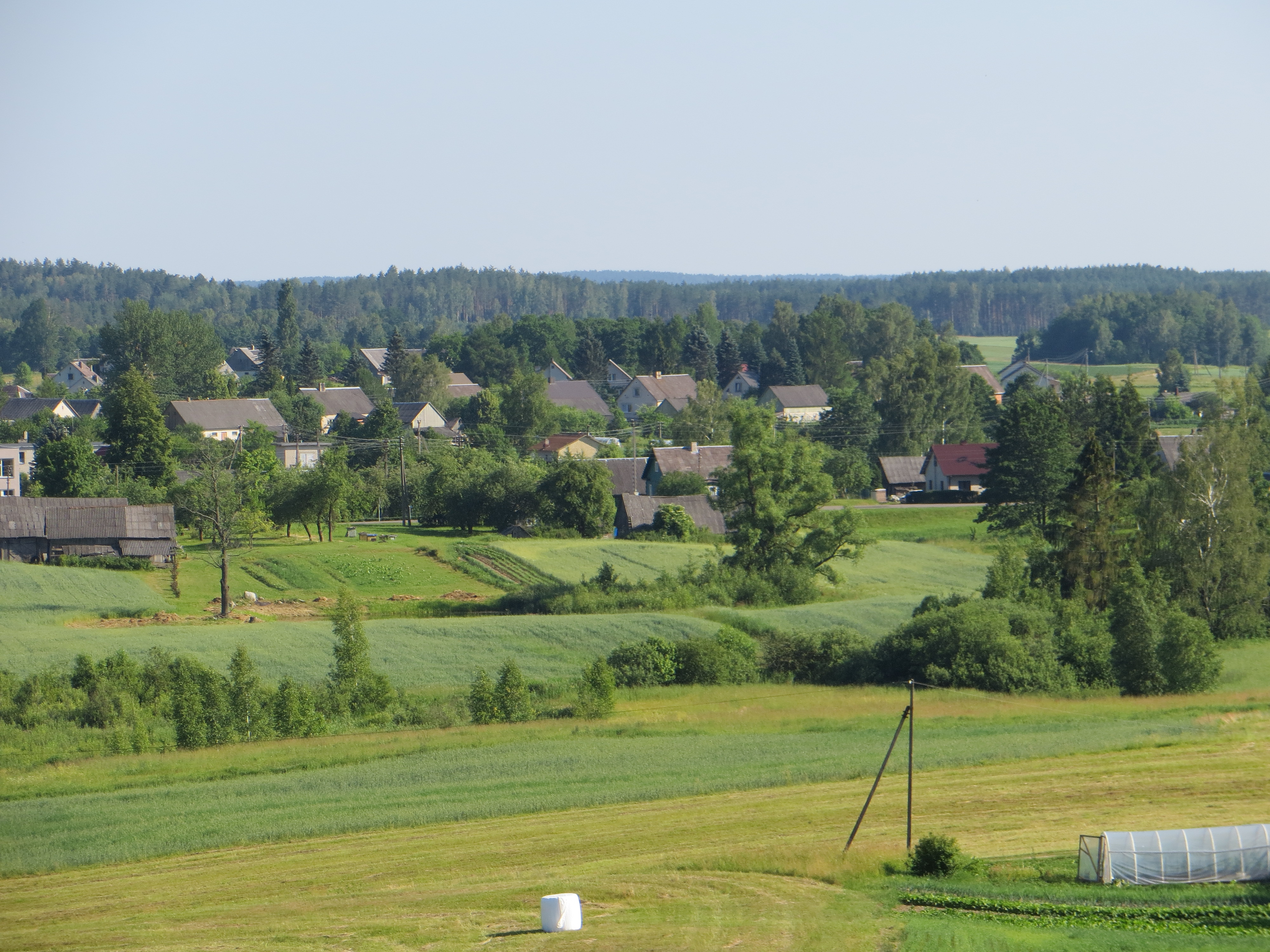 Raitininkų sen., Lithuania